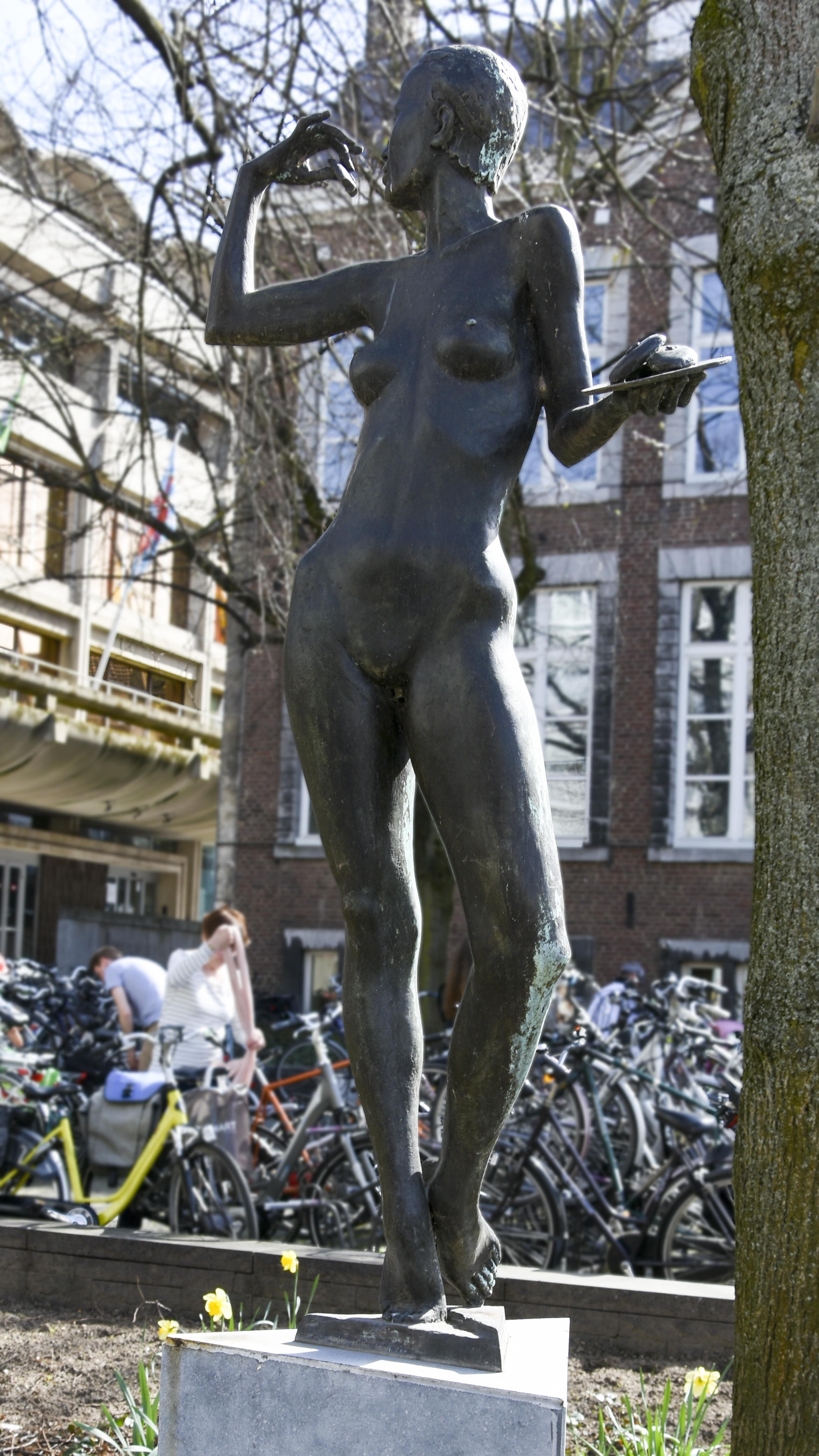 Gerard Moonen - 't Spikklââsvreuke (het speculaasvrouwtje) Hasselt